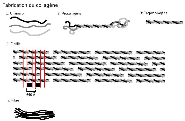 Formation d'une fibre de collagène à partir des chaînes peptidiques, par polymérisations successives. Fait par Solitchka, 2005